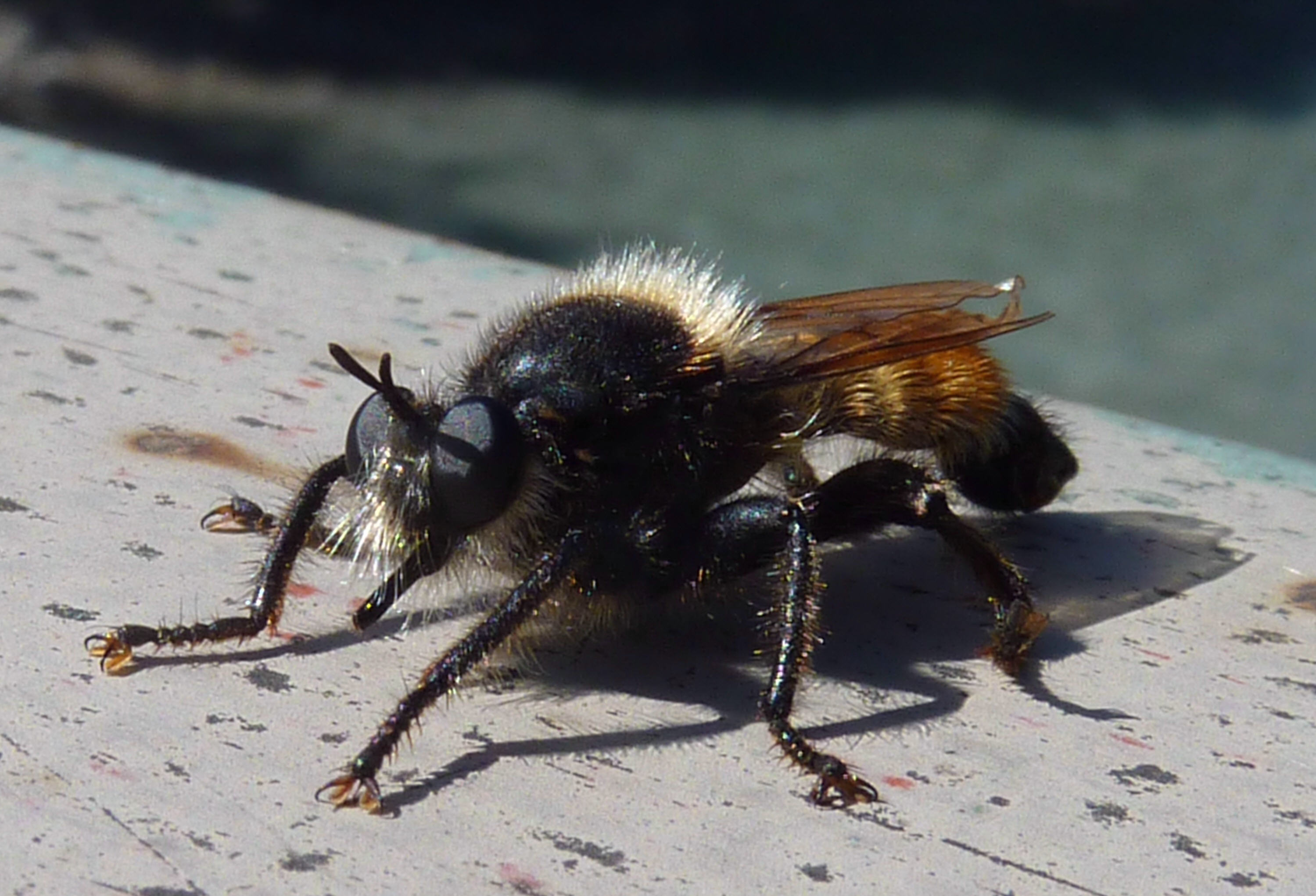 Laphria flava